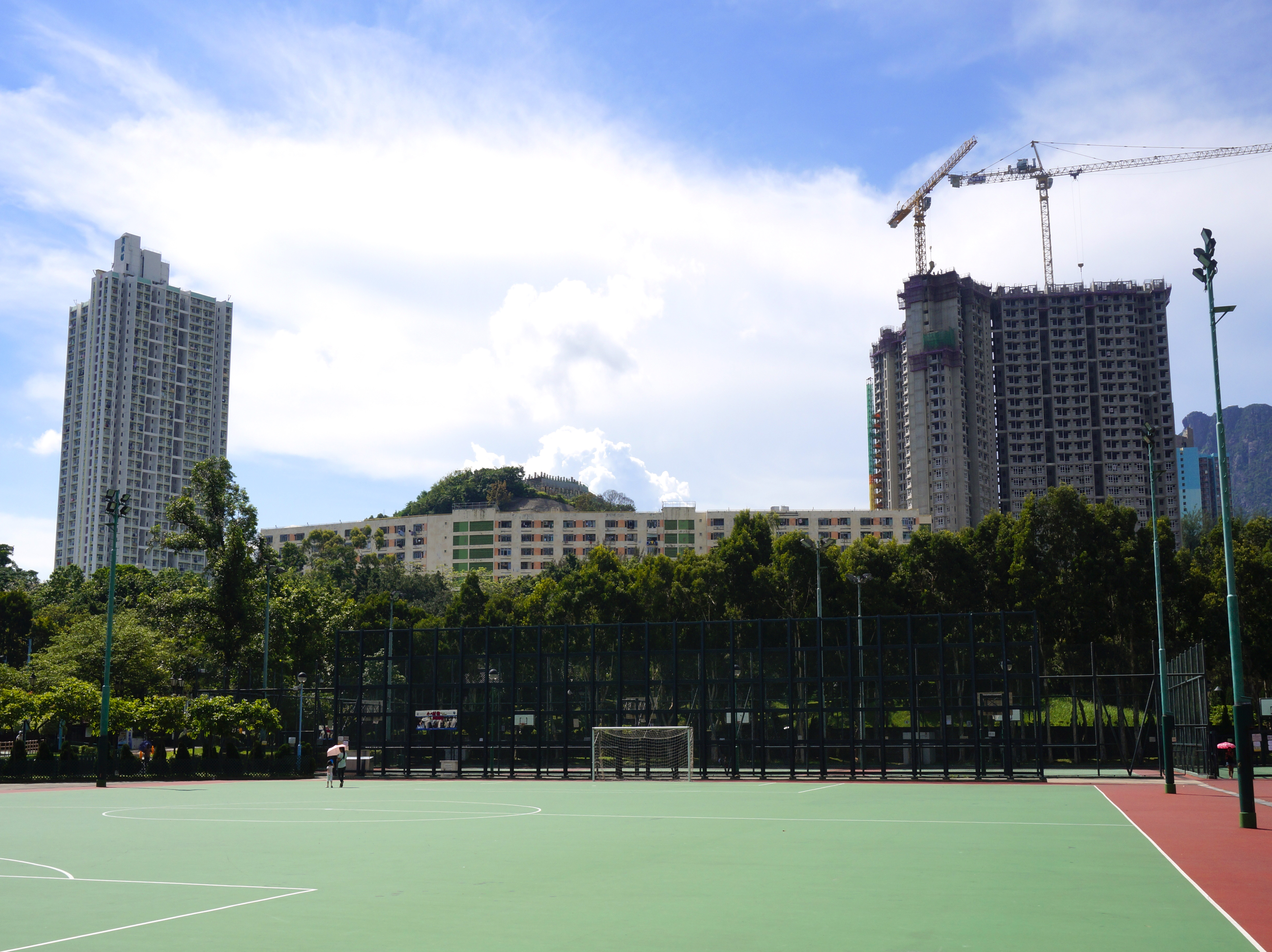 遠眺美東邨各座樓宇